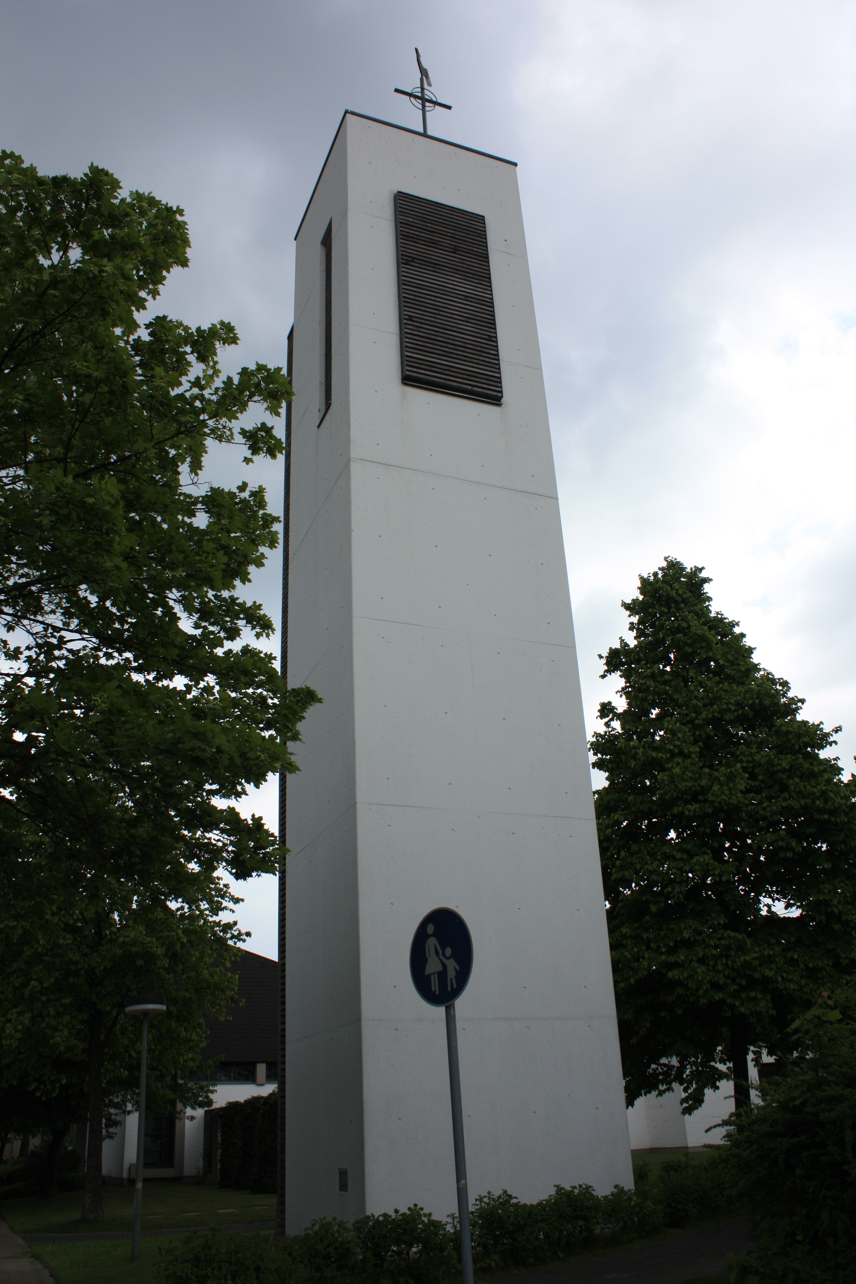 Turm der katholischen Kirche St. Stephanus in Paderborn